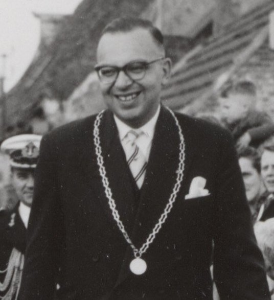 Collectie / Archief : Fotocollectie Elsevier Reportage / Serie : [ onbekend ] Beschrijving : koninklijk huis, bezoeken, publiek, burgemeesters, Juliana, koningin, Michaelis, H.K. Datum : 22 augustus 1957 Locatie : Bruinisse Trefwoorden : bezoeken, burgemeesters, koninklijk huis, publiek Persoonsnaam : Juliana, koningin, Michaelis, H.K. Fotograaf : Pot, Harry / Anefo Auteursrechthebbende : Nationaal Archief Materiaalsoort : Foto (zwart/wit) Nummer archiefinventaris : bekijk toegang 2.24.05.02 Bestanddeelnummer : 015-0151